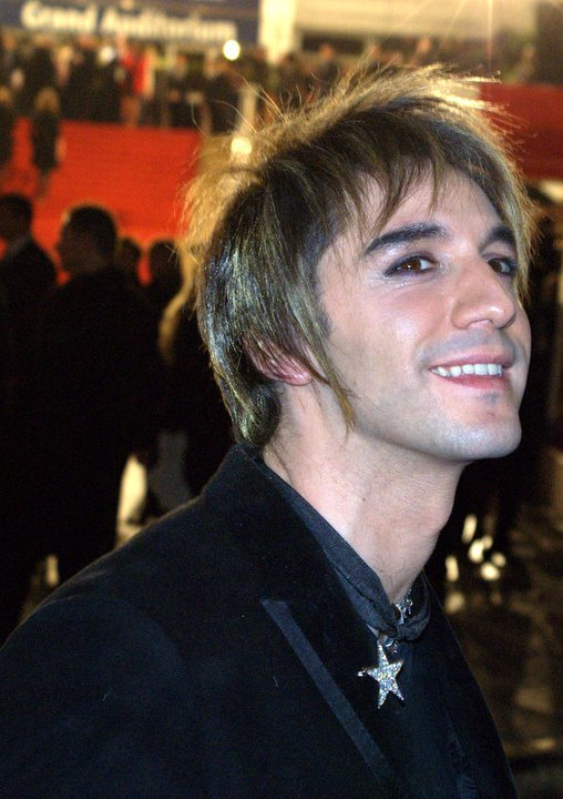 Mikelangelo Loconte aux NRJ Music Awards